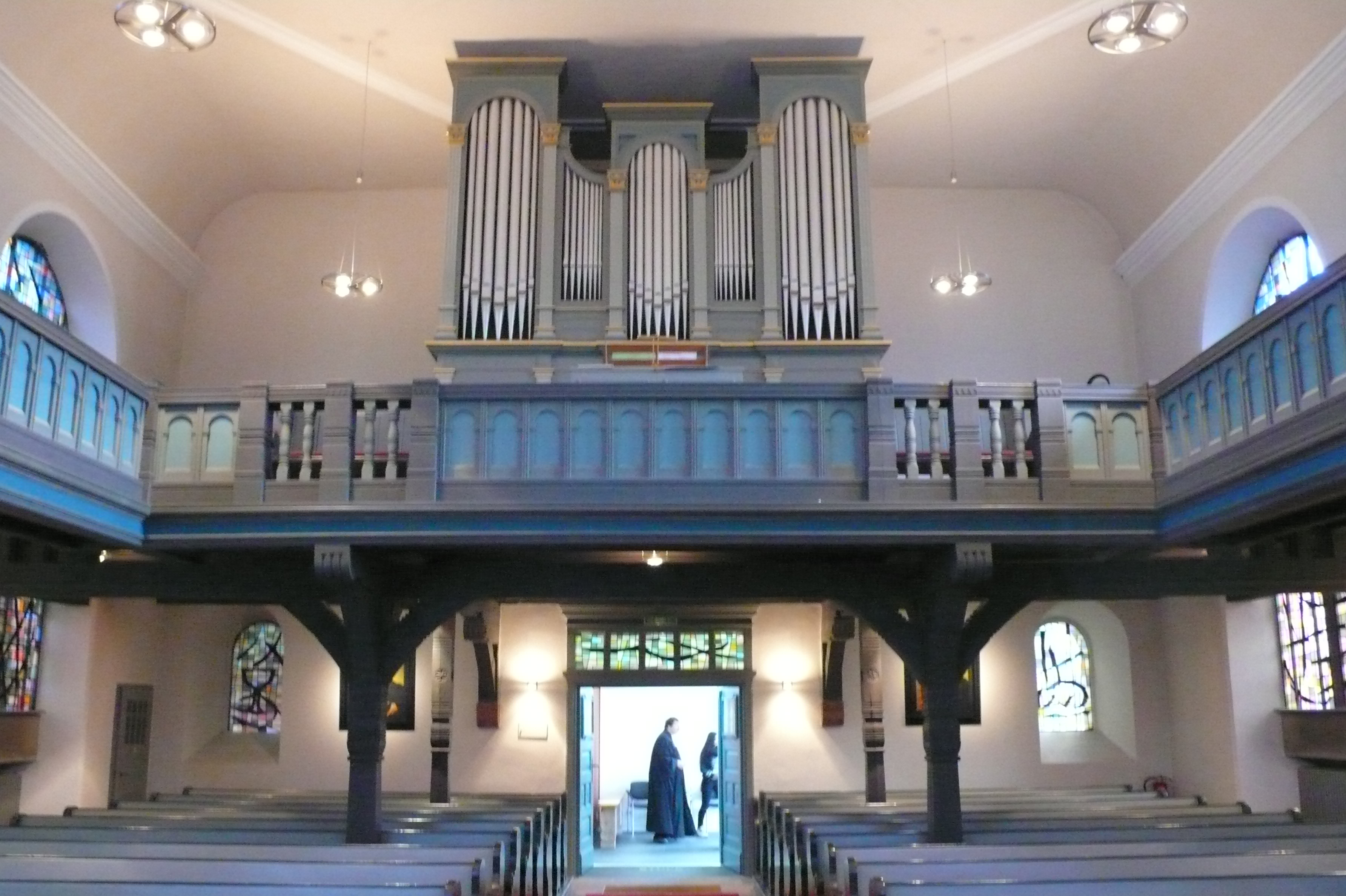 Evangelische Melanchthonkirche in Frankfurt-Fechenheim, barocke Kirche von 1772, Orgelempore und Orgel von Ratzmann